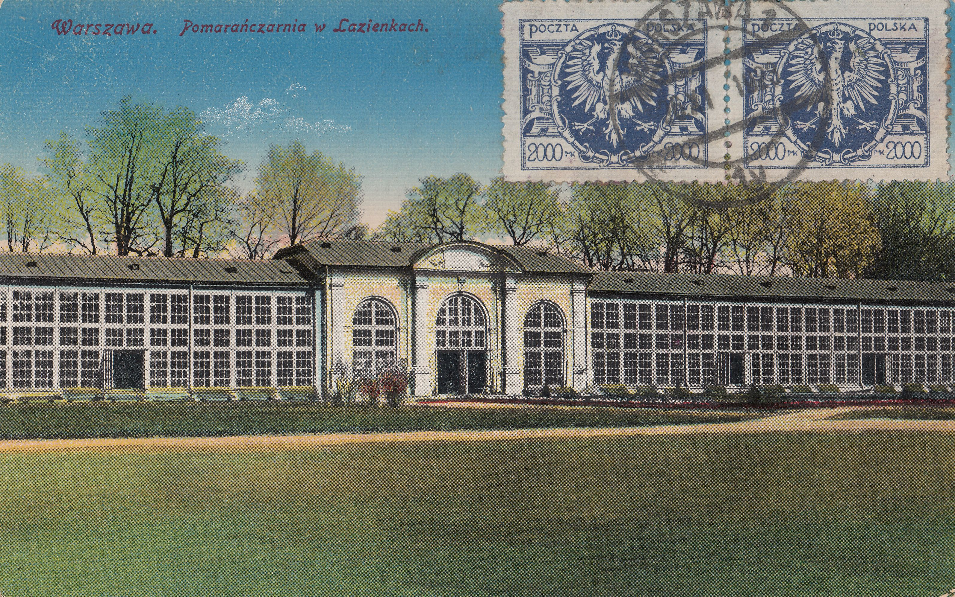 Pawilon kolekcji nieborowskiej w Łazienkach Królewskich